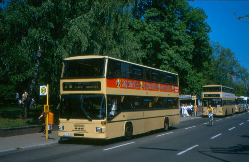 Berlin, BVG Bus 3635, MAN SD 202, am Bahnhof Wannsee